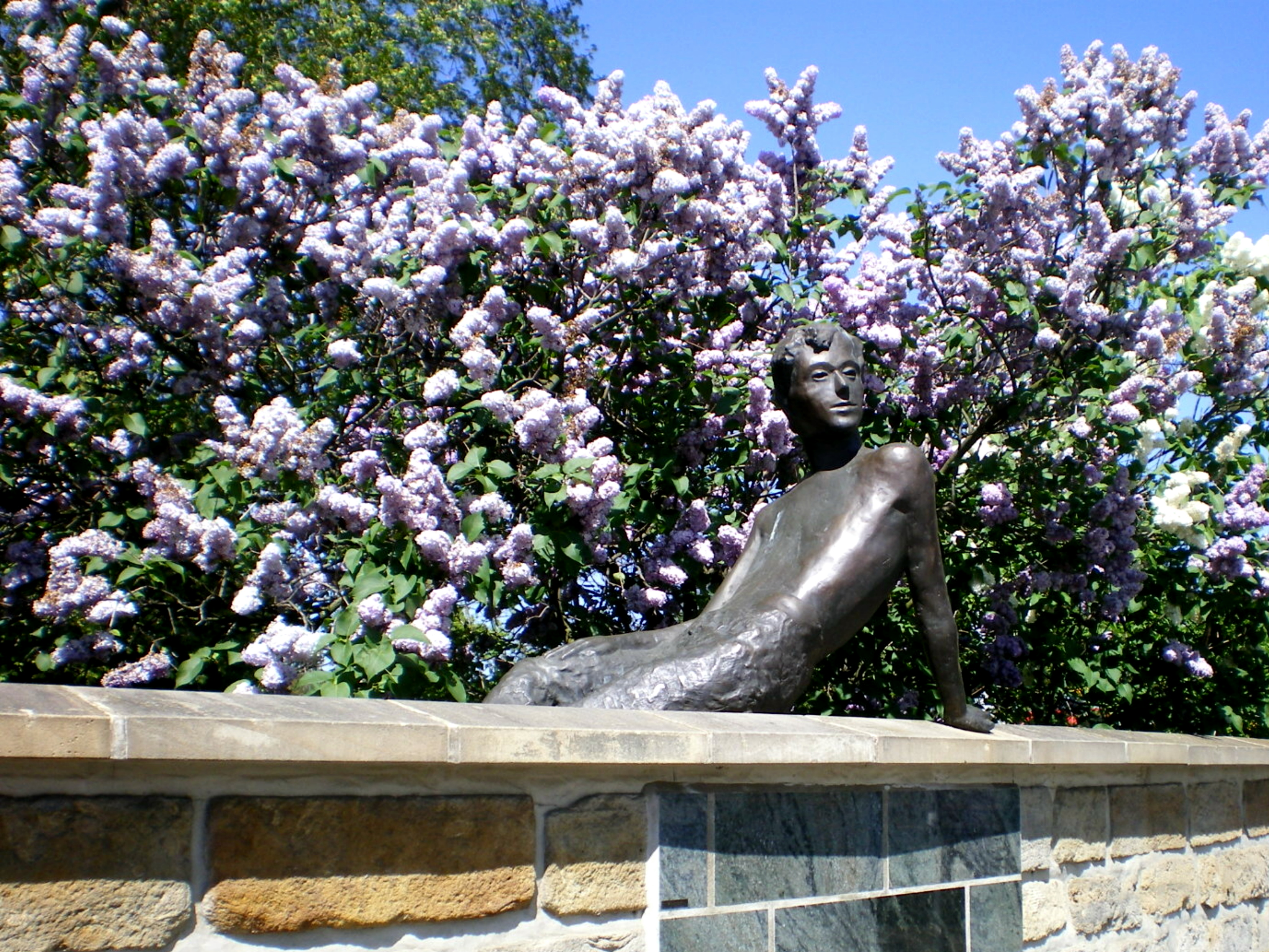 Vargas, Mathyas - 1999 Erich Kästner, Bronze. Dresden-Albertplatz.